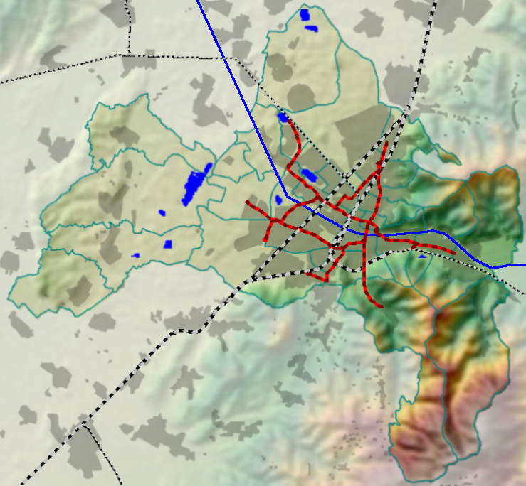 Topographie und Siedlungsfläche von Freiburg im Breisgau, Deutschland